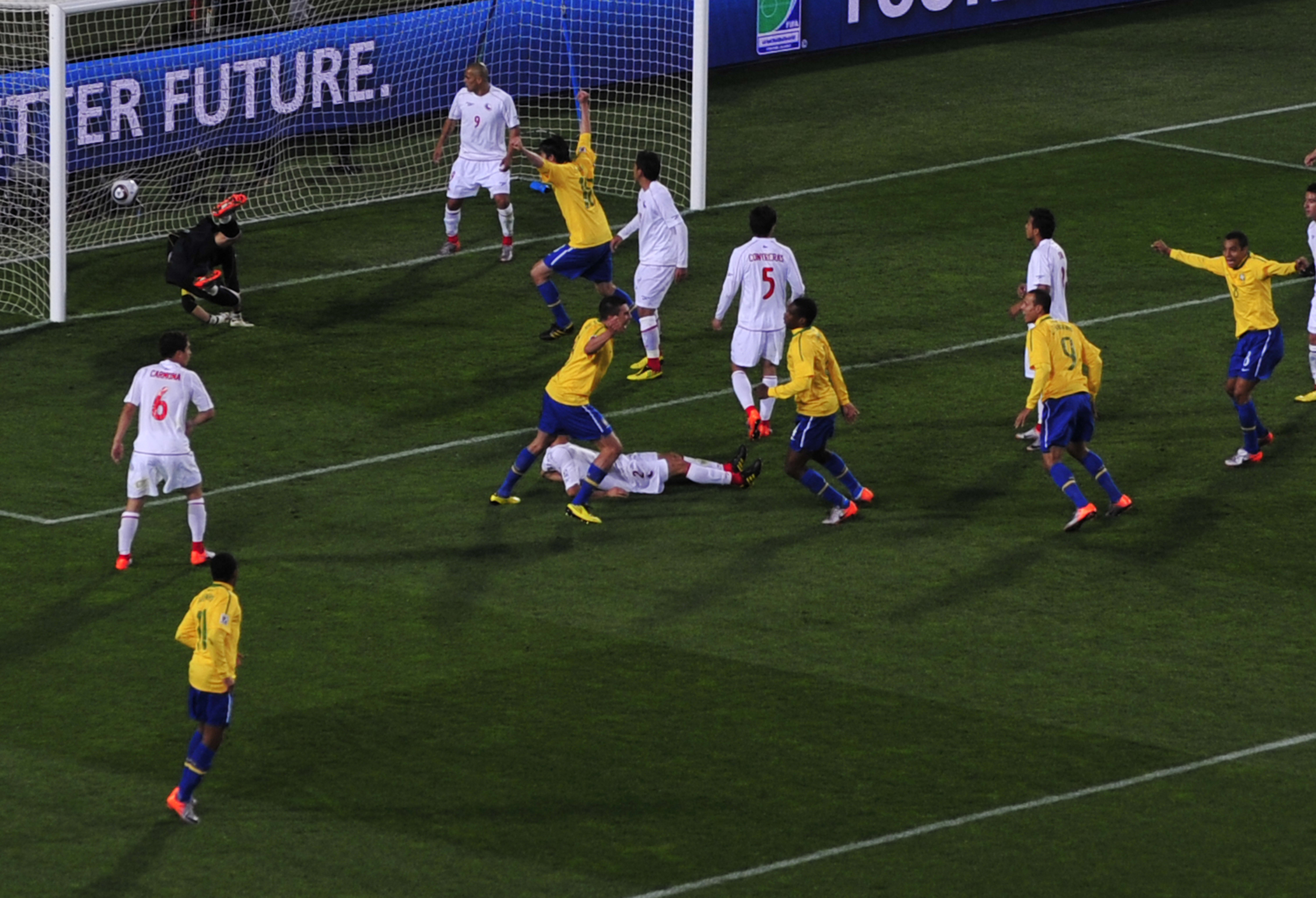 Joanesburgo - Com a vitória de 3 x 0 sobre o Chile, a seleção brasileira passa para as quartas de final da Copa do Mundo.